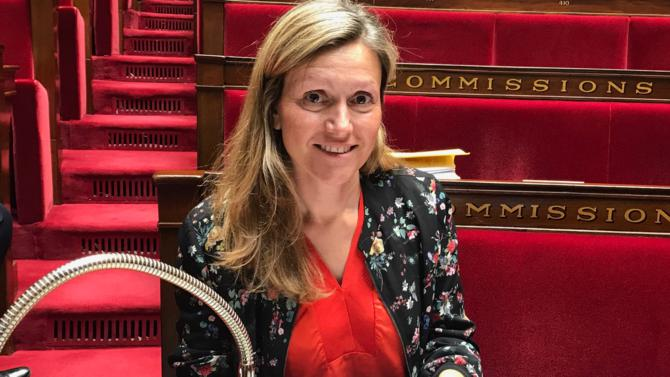 Yaël Braun-Pivet Banc des Commissions juillet 2017